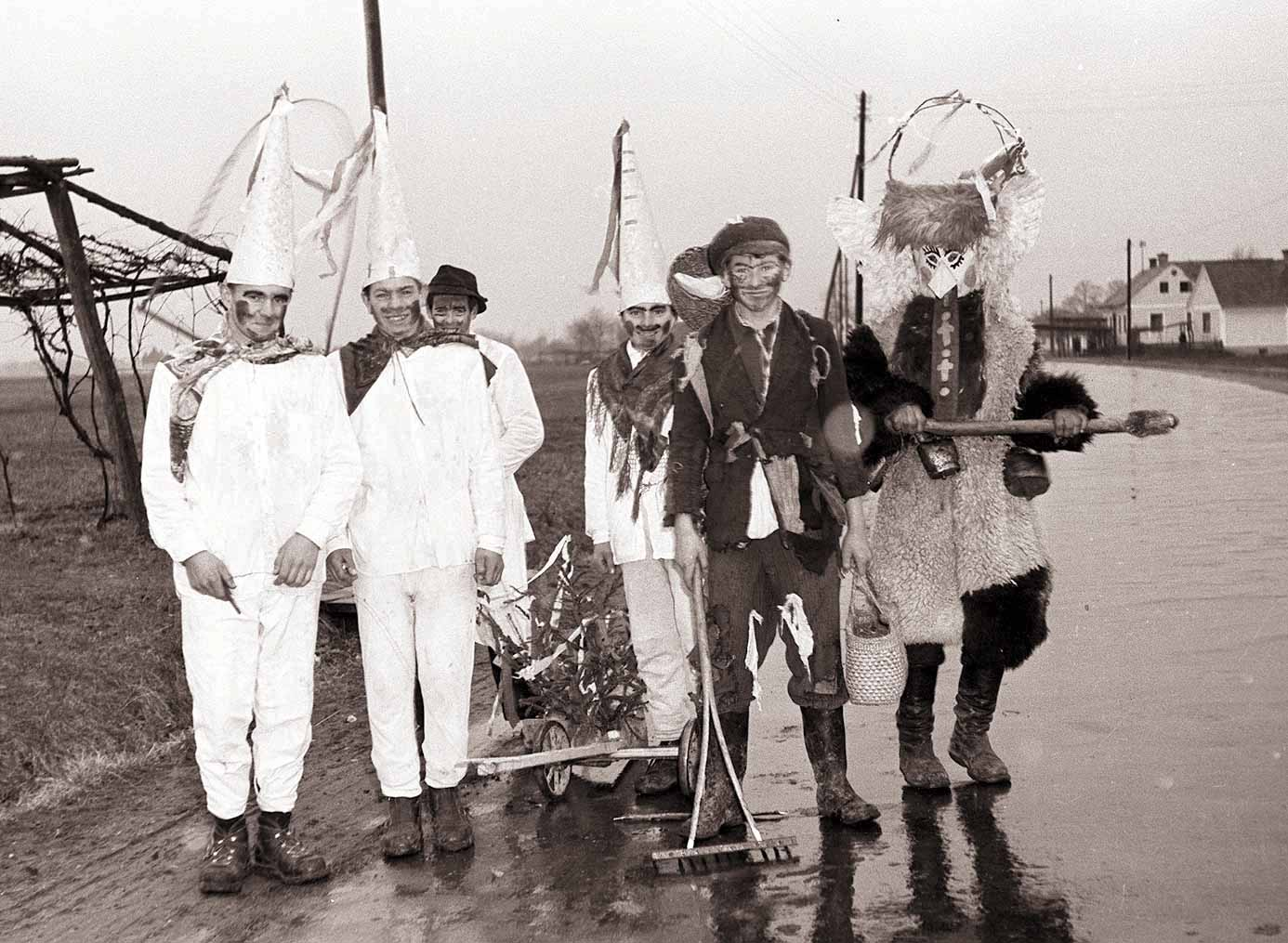 Orači in kurenti pri Markovcih